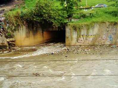 Cañada Negra o Seca stream, Medellín